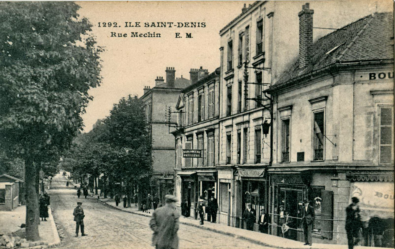 carte postale ancienne éditée par EM, N°1292L'Île-Saint-Denis : La rue Méchain (RN 186)